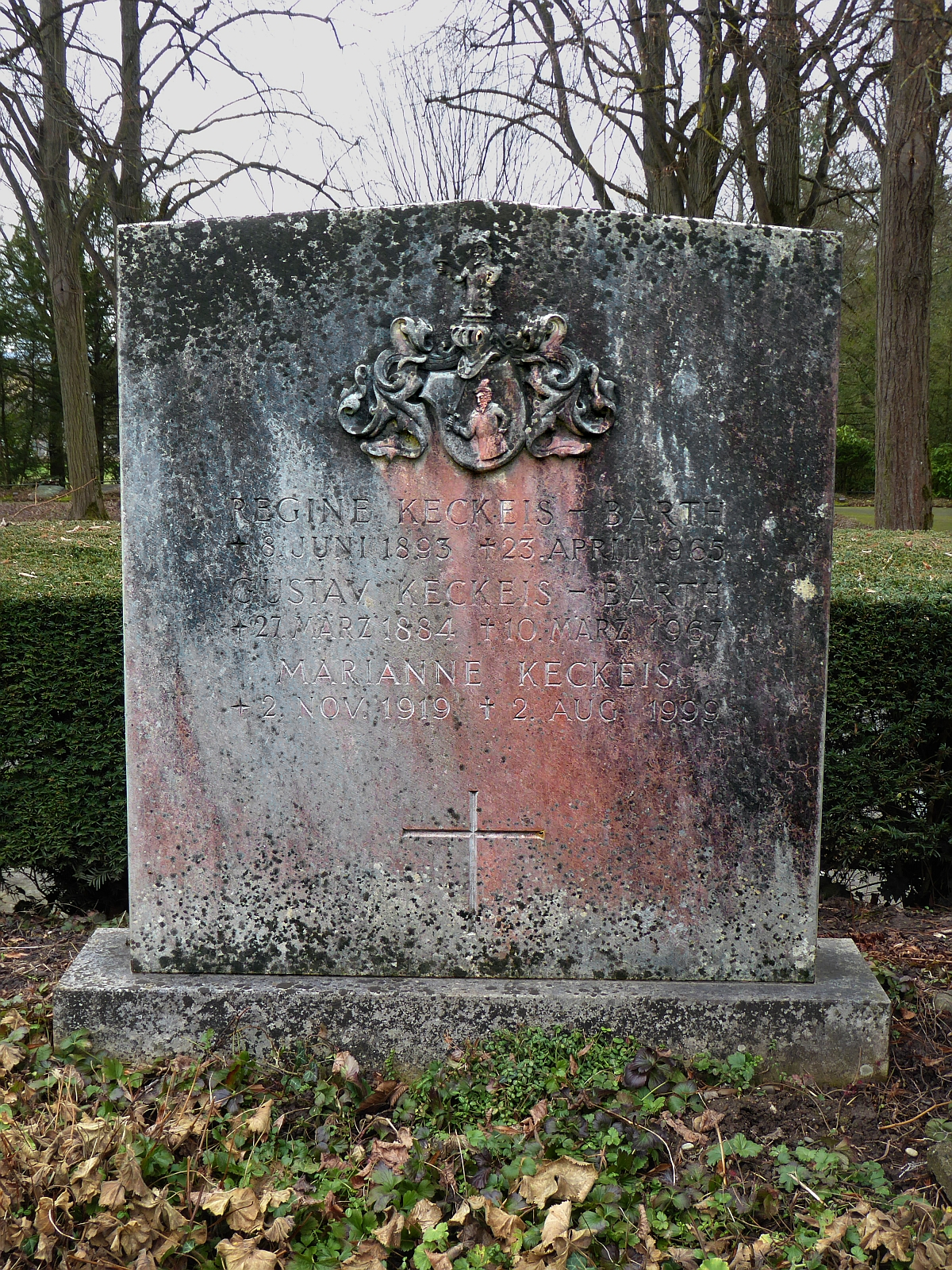 Gustav Keckeis-Barth (1884–1967), Dr.phil I, Verlagsdirektor, Herder Verlag in Freiburg i.Br., Leiter des Benziger Verlags in Zürich, Autor, Grab auf dem Friedhof Hörnli, Riehen, Basel-Stadt